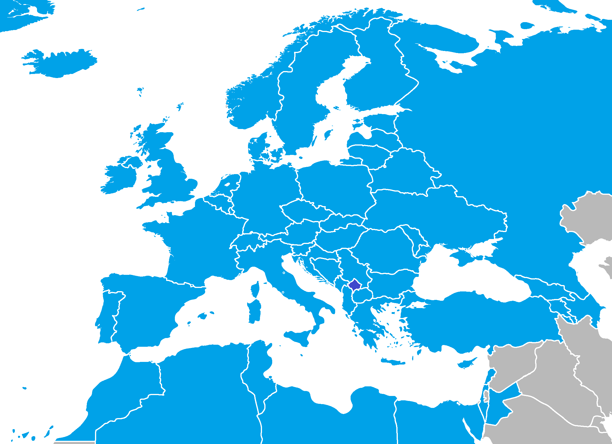 landen die mogen meedoen aan ESF